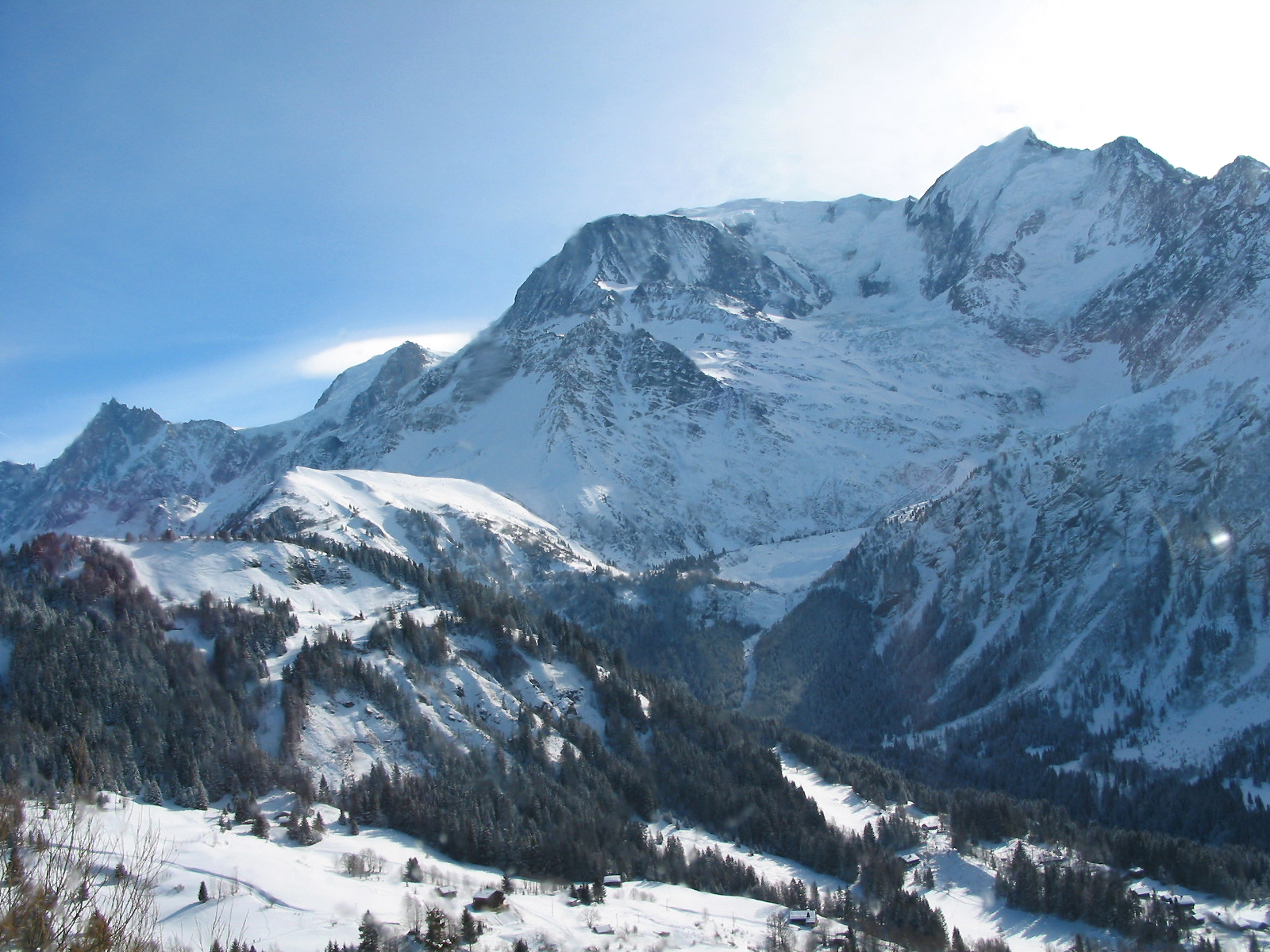 Bionassay (Haute-Savoie - France), l'Aiguille de Bionassay et son glacier.